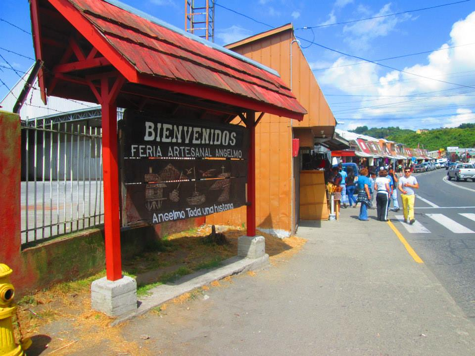 Entrada al mercado de Angelmó, Puerto Montt.